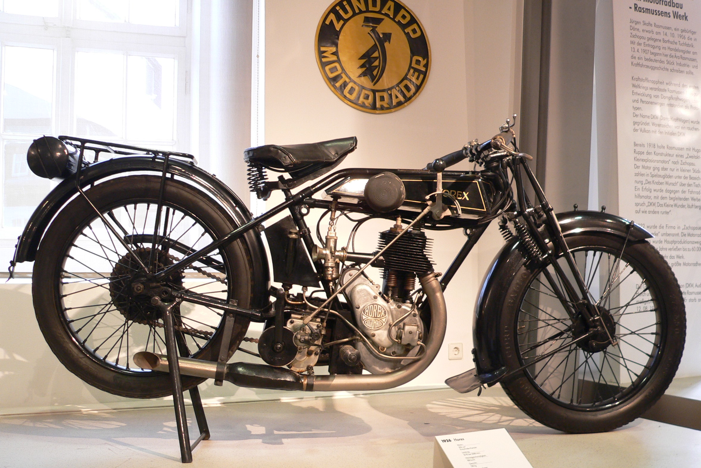 Motorbike "Horex" (1926) at the Deutsches Zweirad- und NSU-Museum (596 cm³, 10 PS bei 3.500 U/min., 100 km/h)